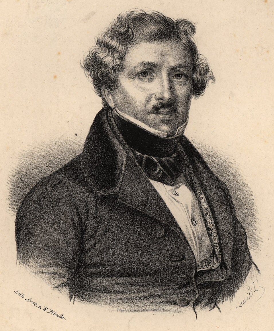 Louis-Jacques-Mandé Daguerre (18 November 1787 – 10 July 1851)